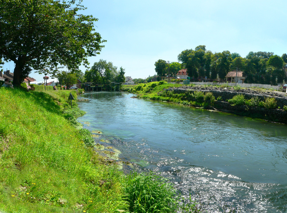 La Canche à Montreuil (panorama)